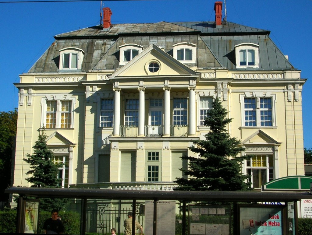 Willa W. Blumwe ul. Gdańska 50, siedziba radia PIK